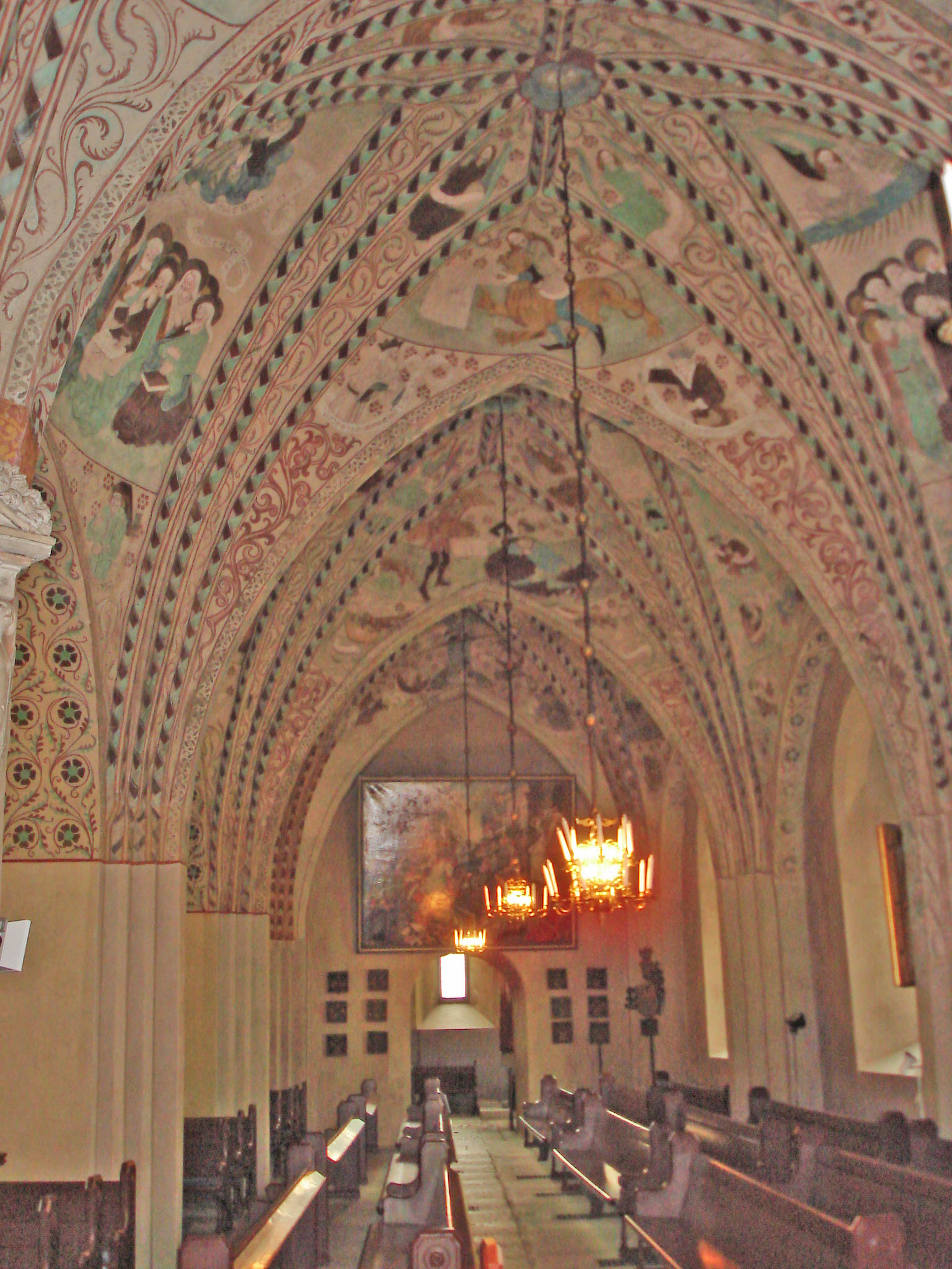 Fotat av församlingsmedlem (tompen0000), 2006.